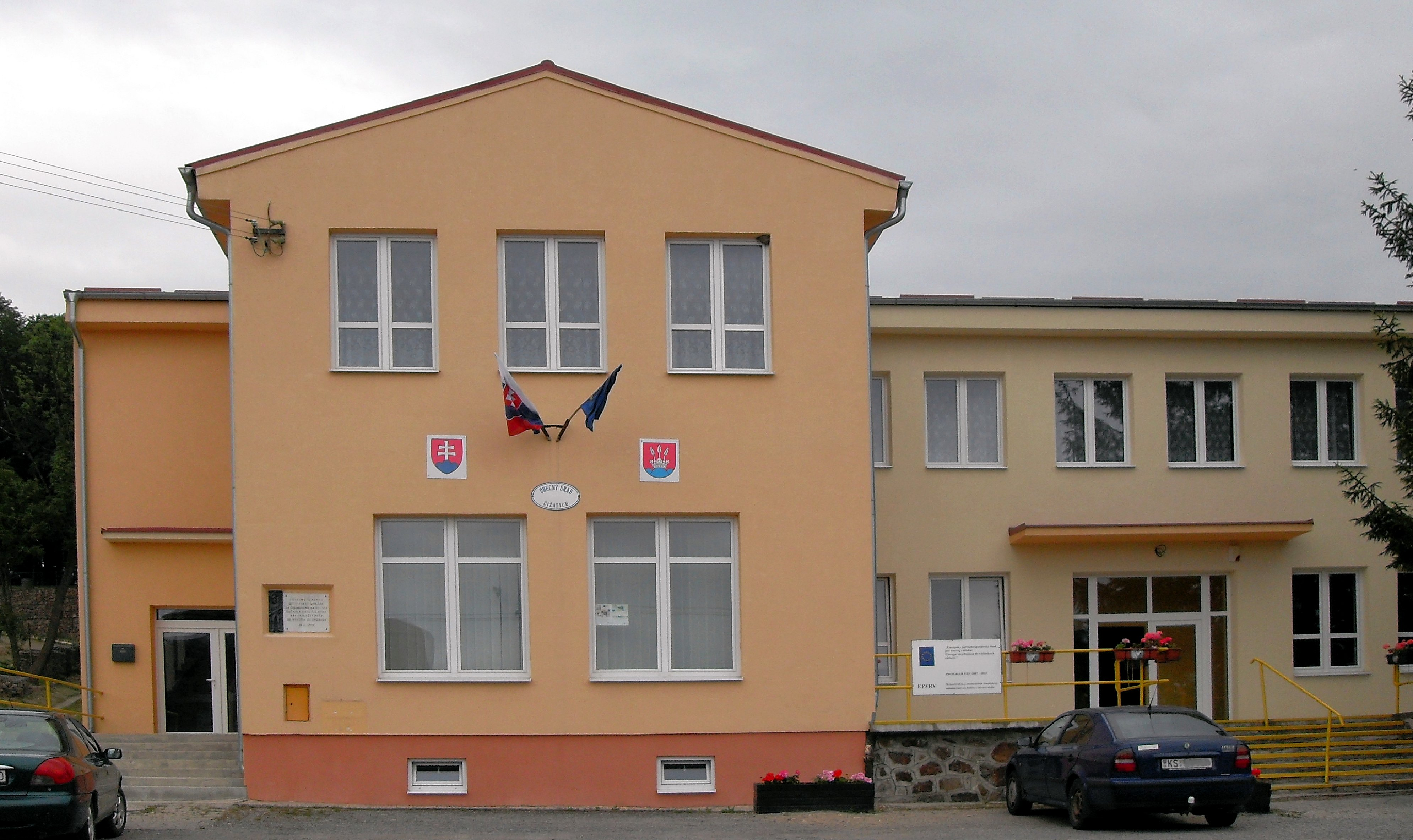 Obecný úrad v Čižatice